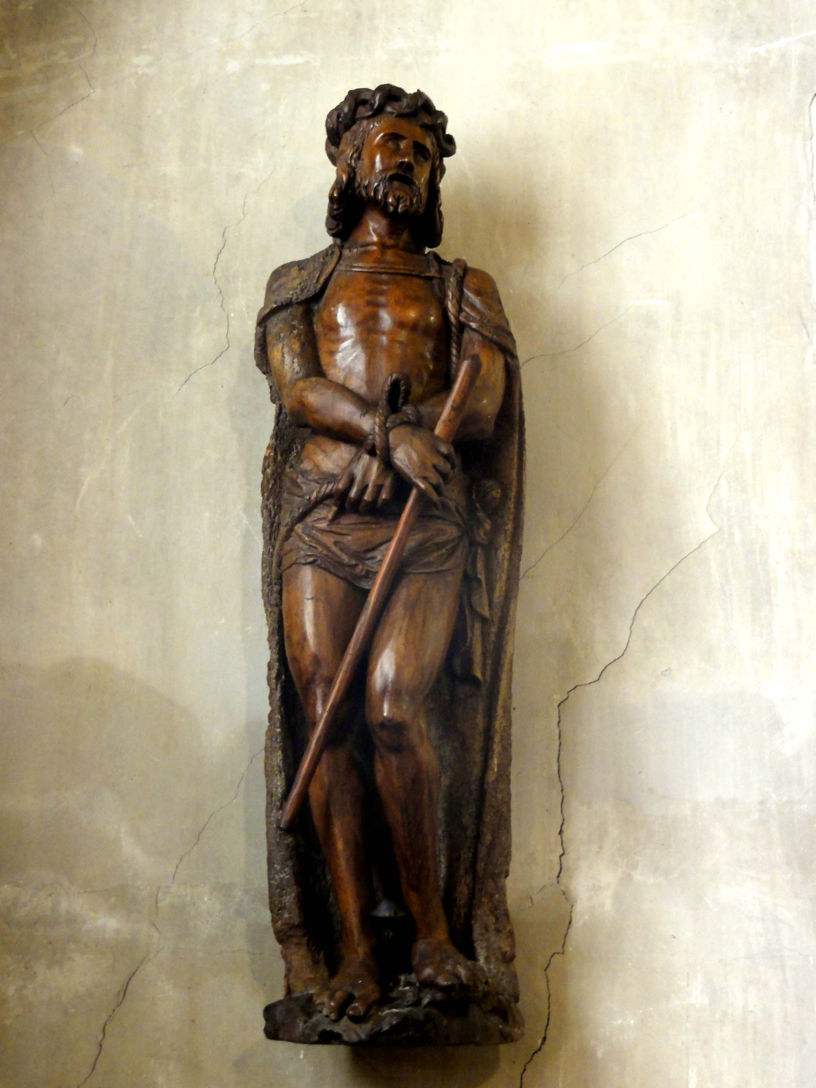 Ecce homo ou Christ de pitié, seconde moitié XVIe siècle.